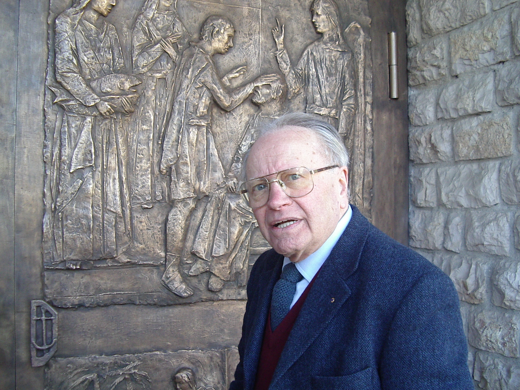 Lo scultore Artemio Giovagnoni davanti al portale in bronzo realizzato per la chiesa di San Raffaele Arcangelo di Perugia.